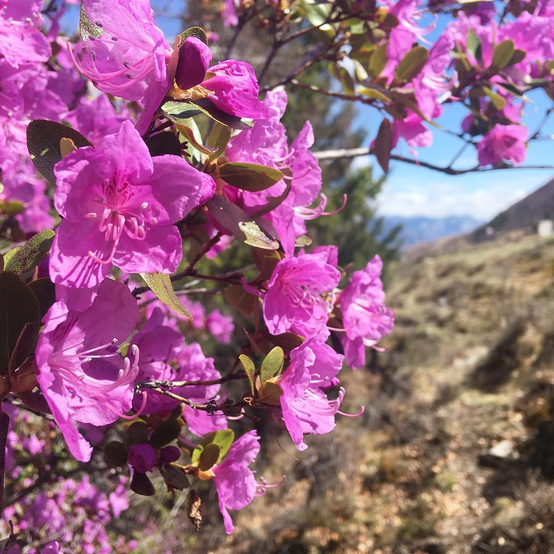 Рододендрон Ледебура, местное название — Маральник, в горах Алтая (долина реки Большая Ильгумень, Онгудайский район Республики Алтай), 3 мая 2019 года